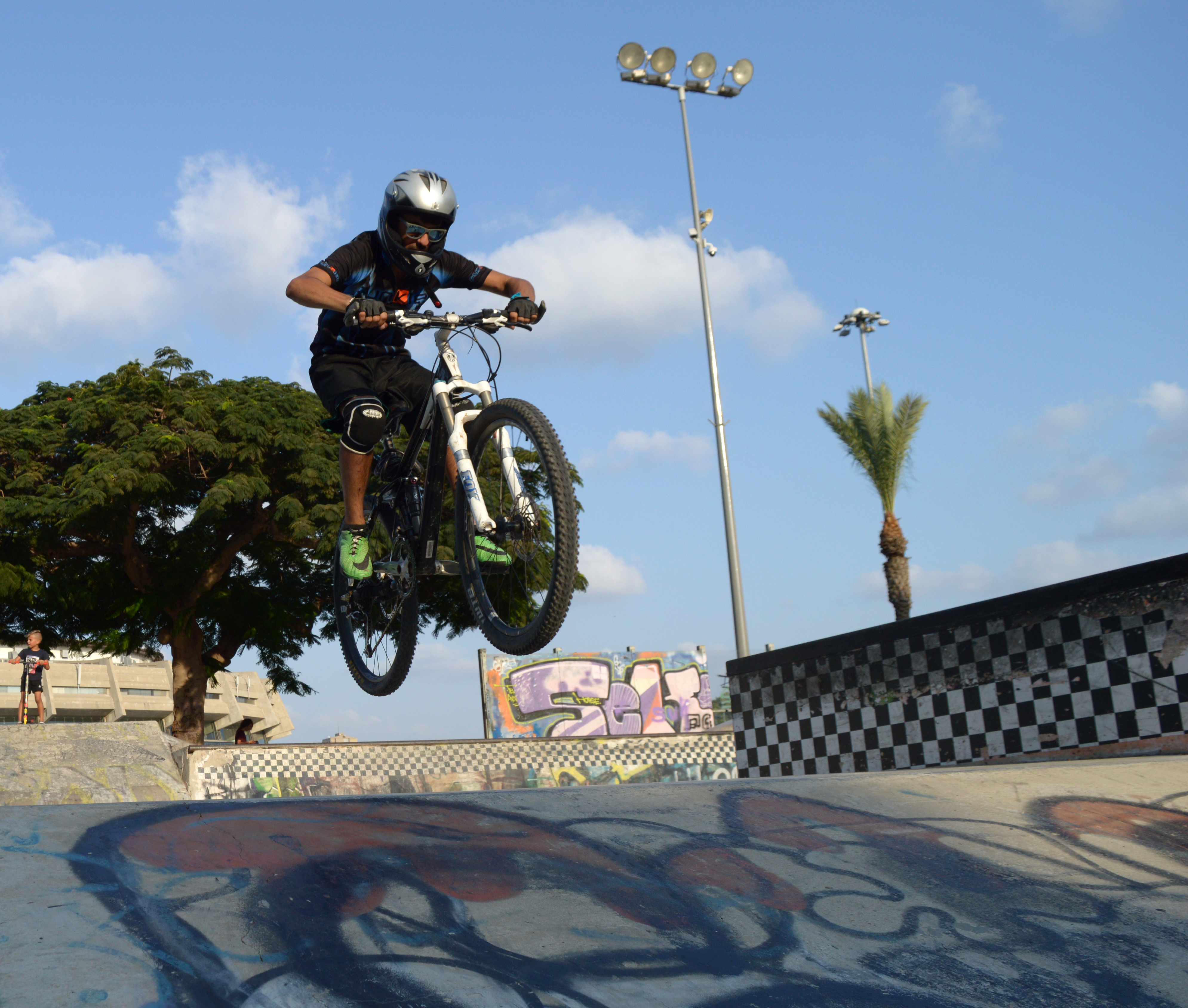 אופני הרים1 פארק גלית